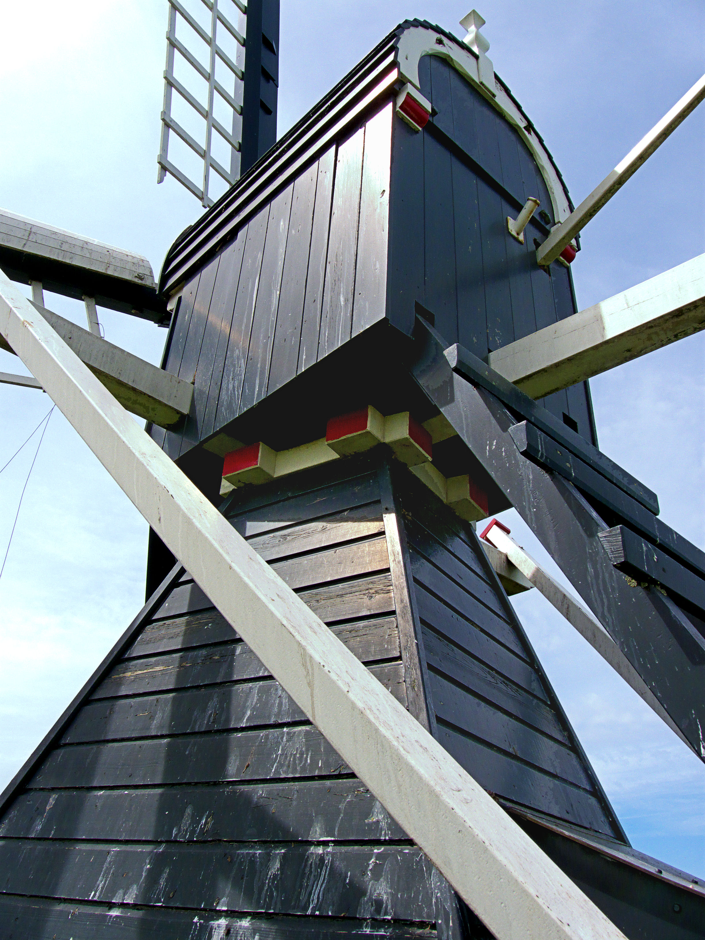 Molen De Kemphaan, Texel, zetel